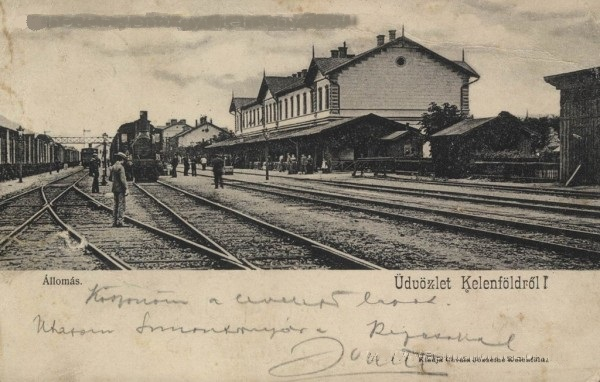 A Kelenföldi pályaudvar 1903-ban régi képeslapon